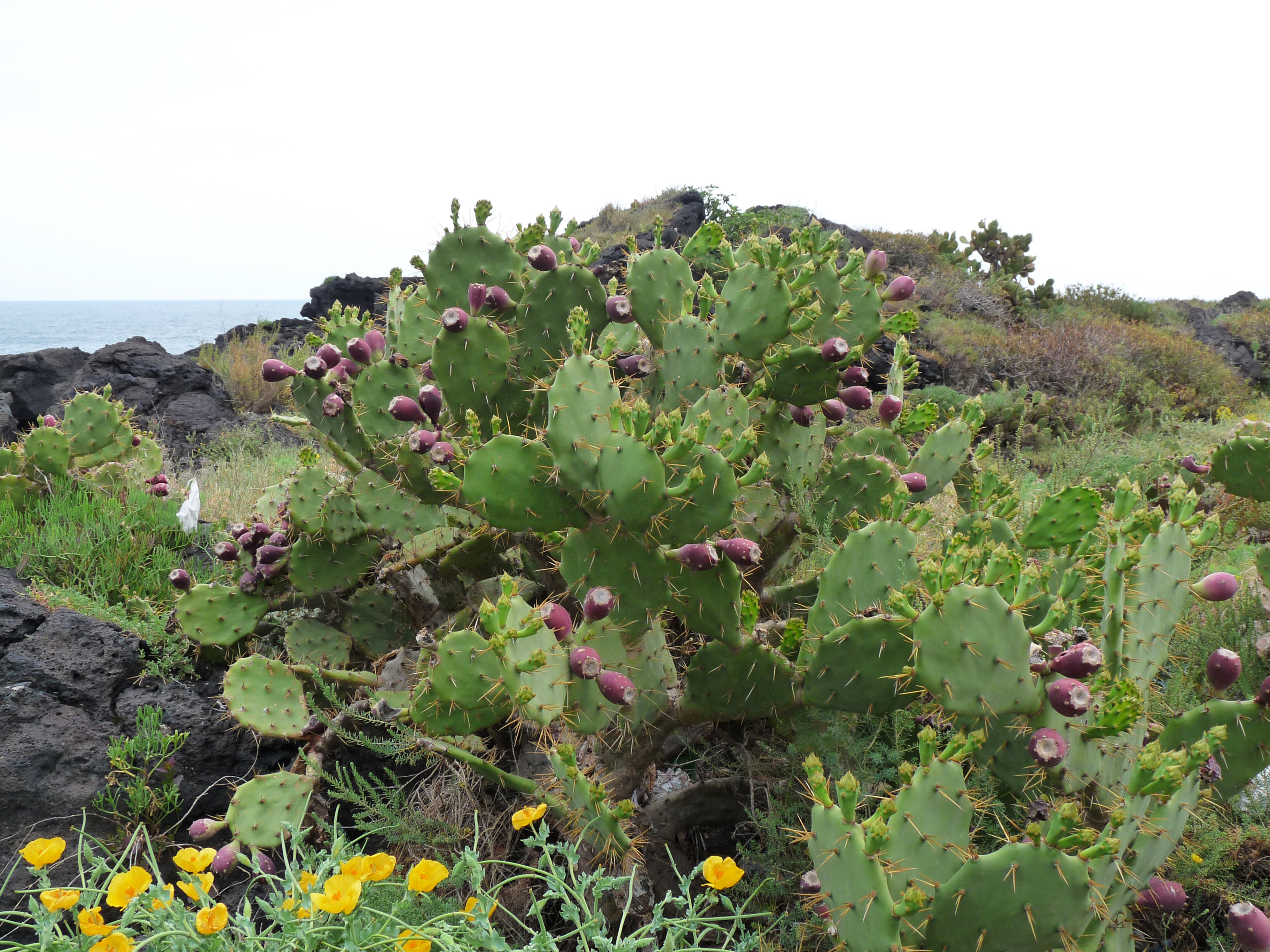 Figuiers de Barbarie sur la roche volcanique en bord de mer au nord de Catane (Sicile)